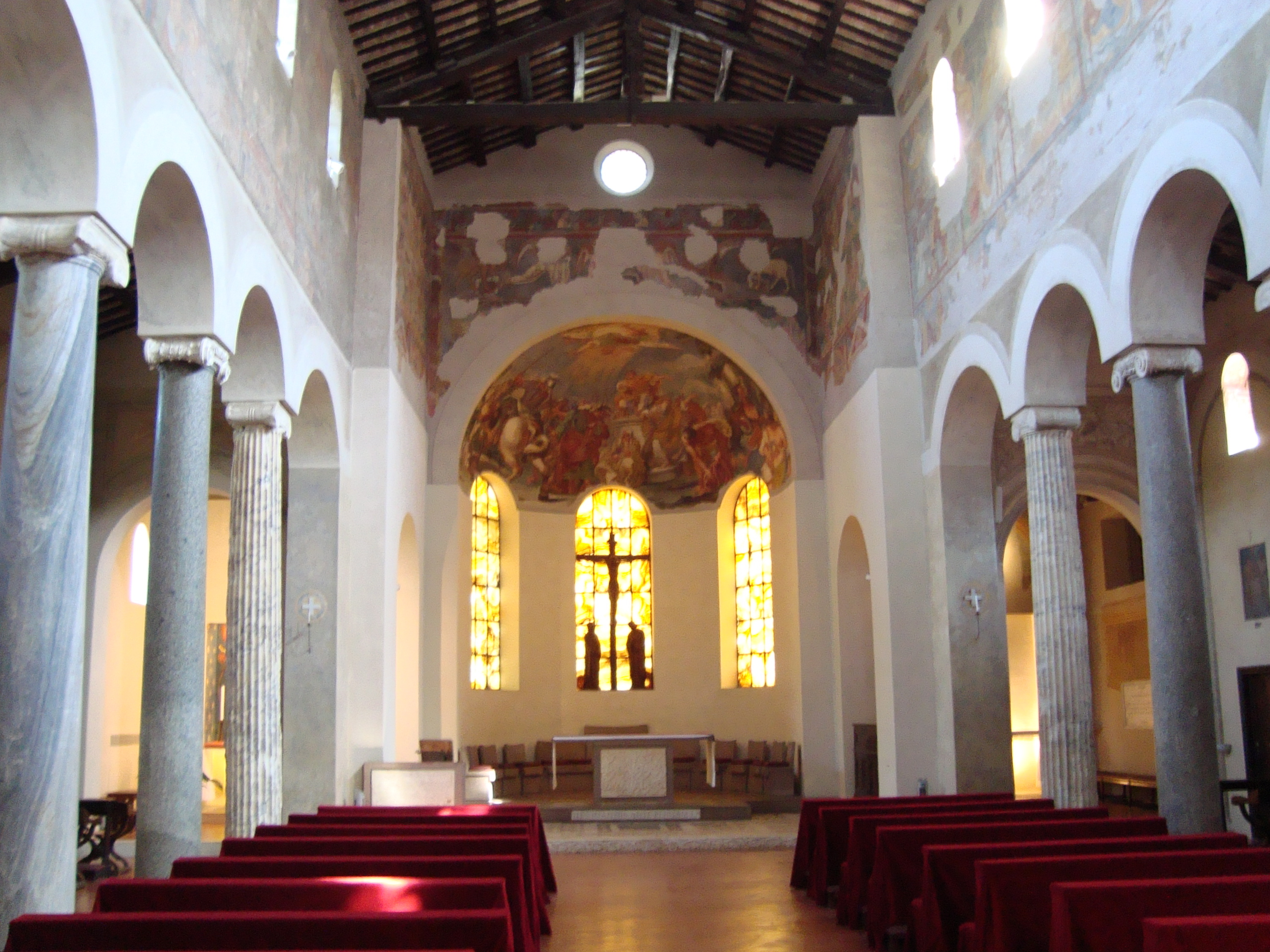 Nef de l'église San Giovanni a Porta Latina à Rome